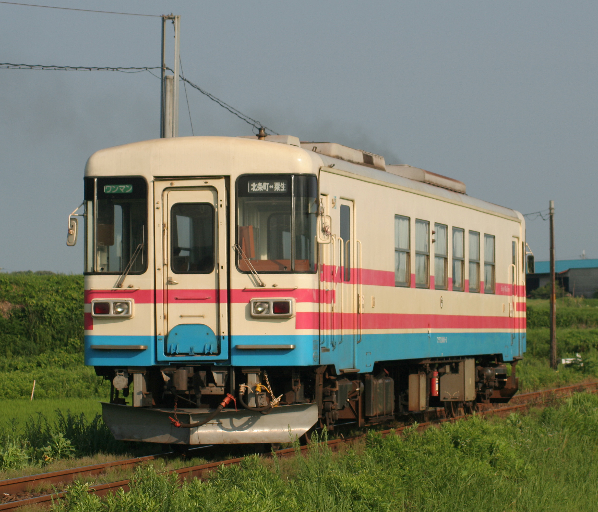 北条鉄道フラワ2000形気動車3（元ミキ300-104） 法華口 - 播磨下里間にて撮影